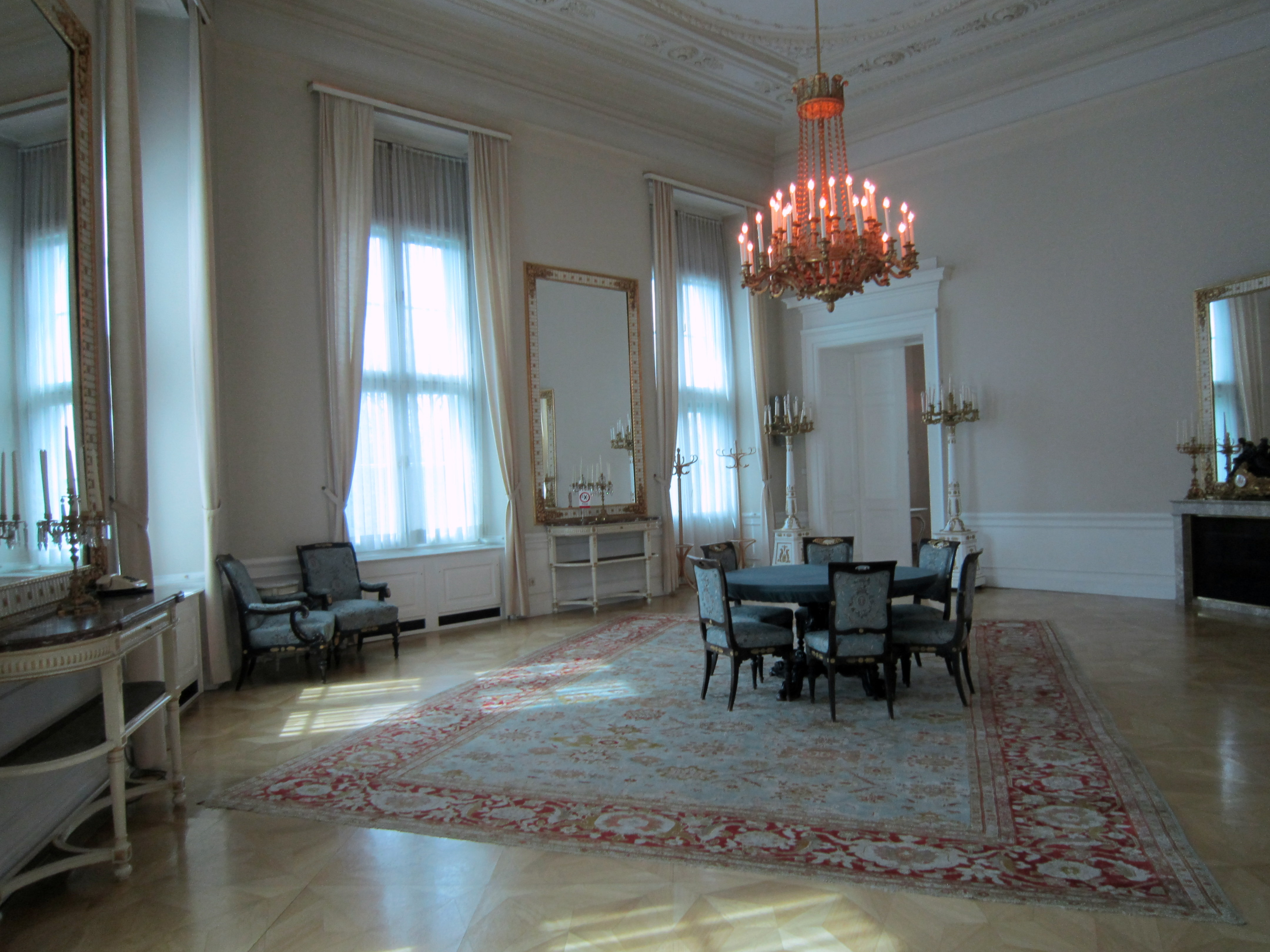 Bundeskanzleramt und Österr. Haus-, Hof- und Staatsarchiv